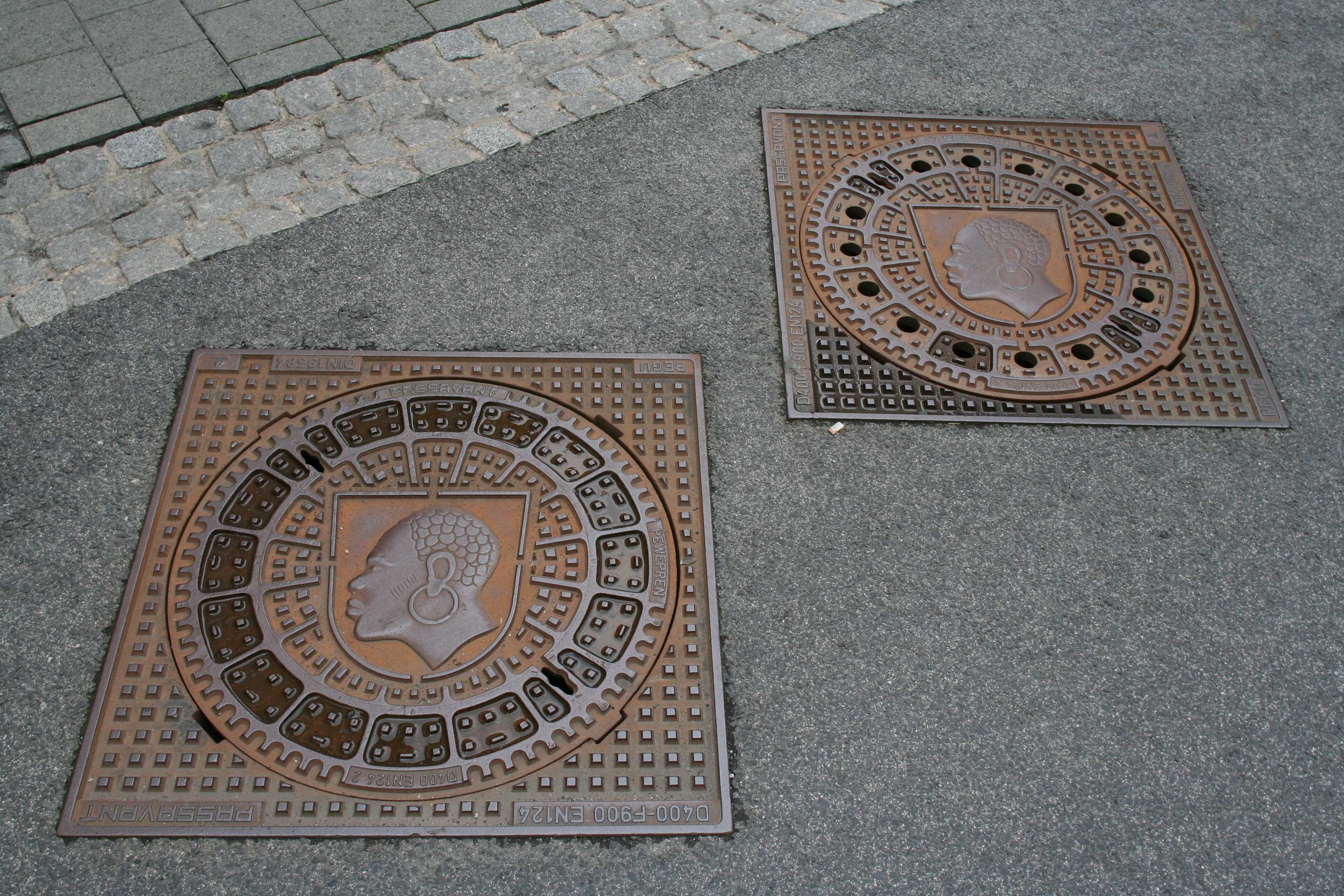 Kanaldeckel Coburgs